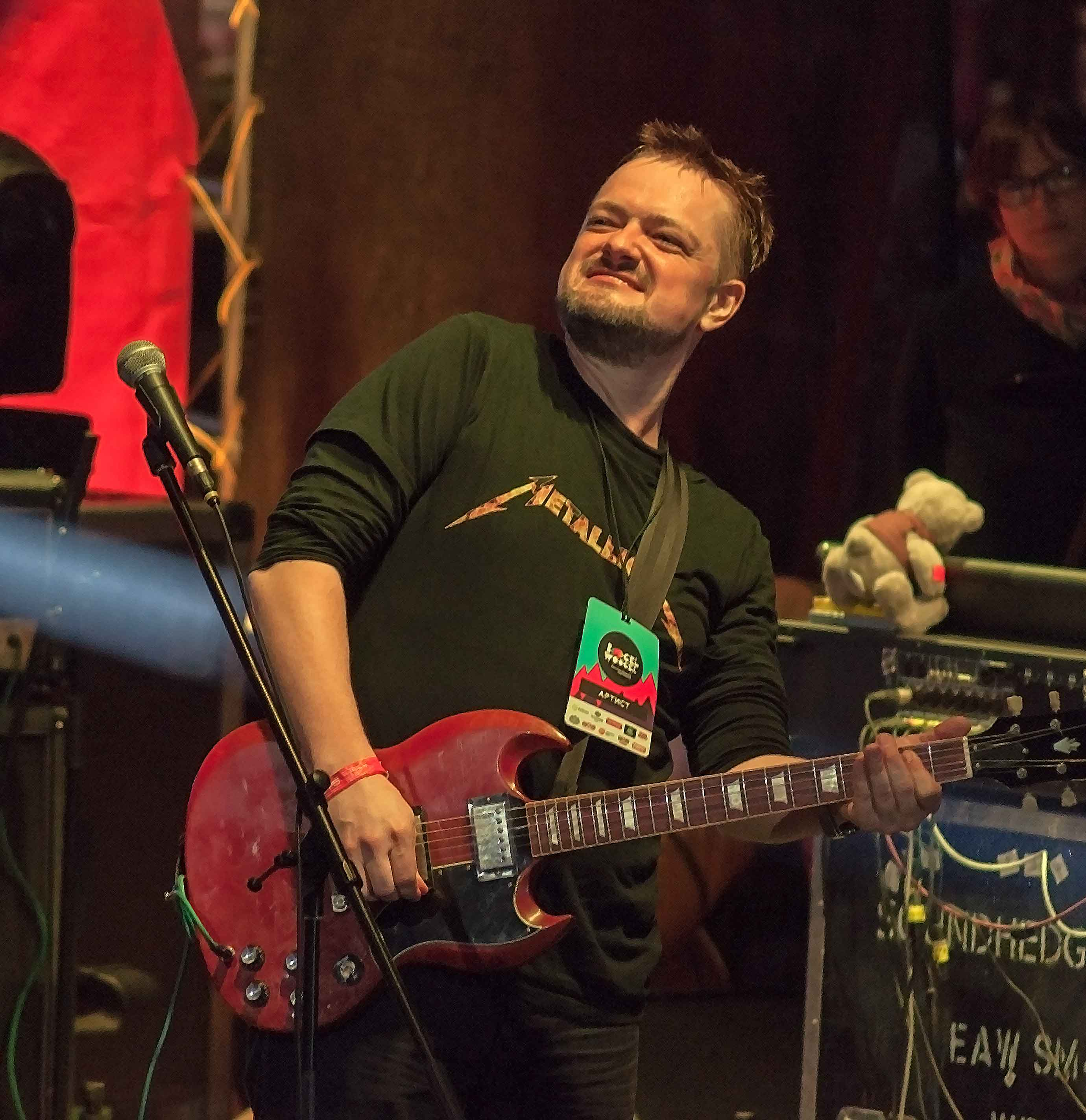 Александр Пушной & the band